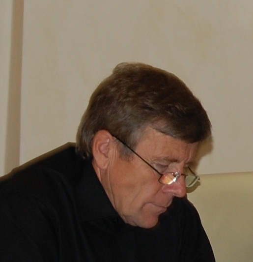 Josaef Zahradníček (2014)